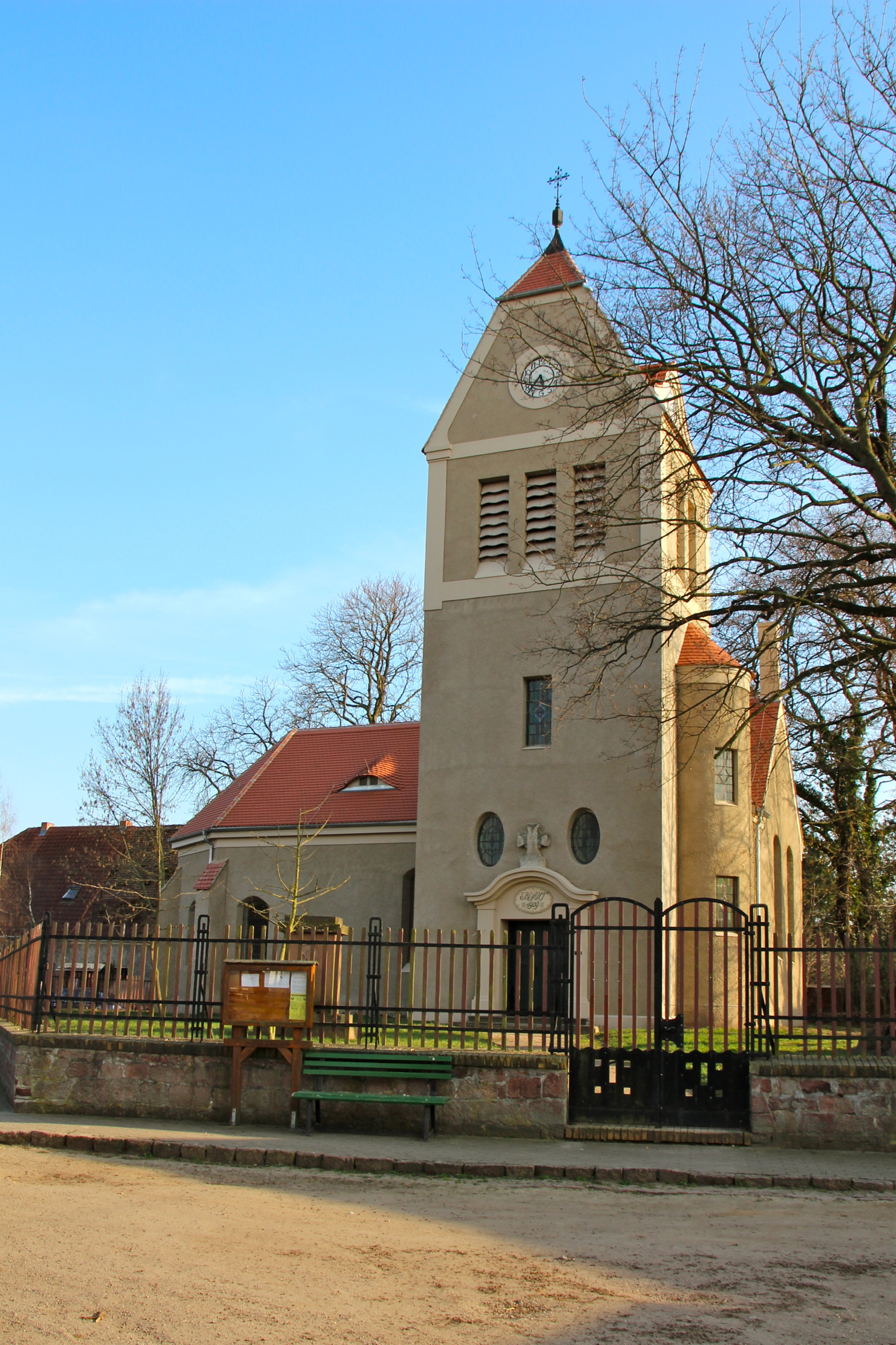 Die Evangelische Kirche in Piethen, Sachsen-Anhalt, gehört und dient einer reformierten Gemeinde der unierten Evangelischen Landeskirche Anhalts.